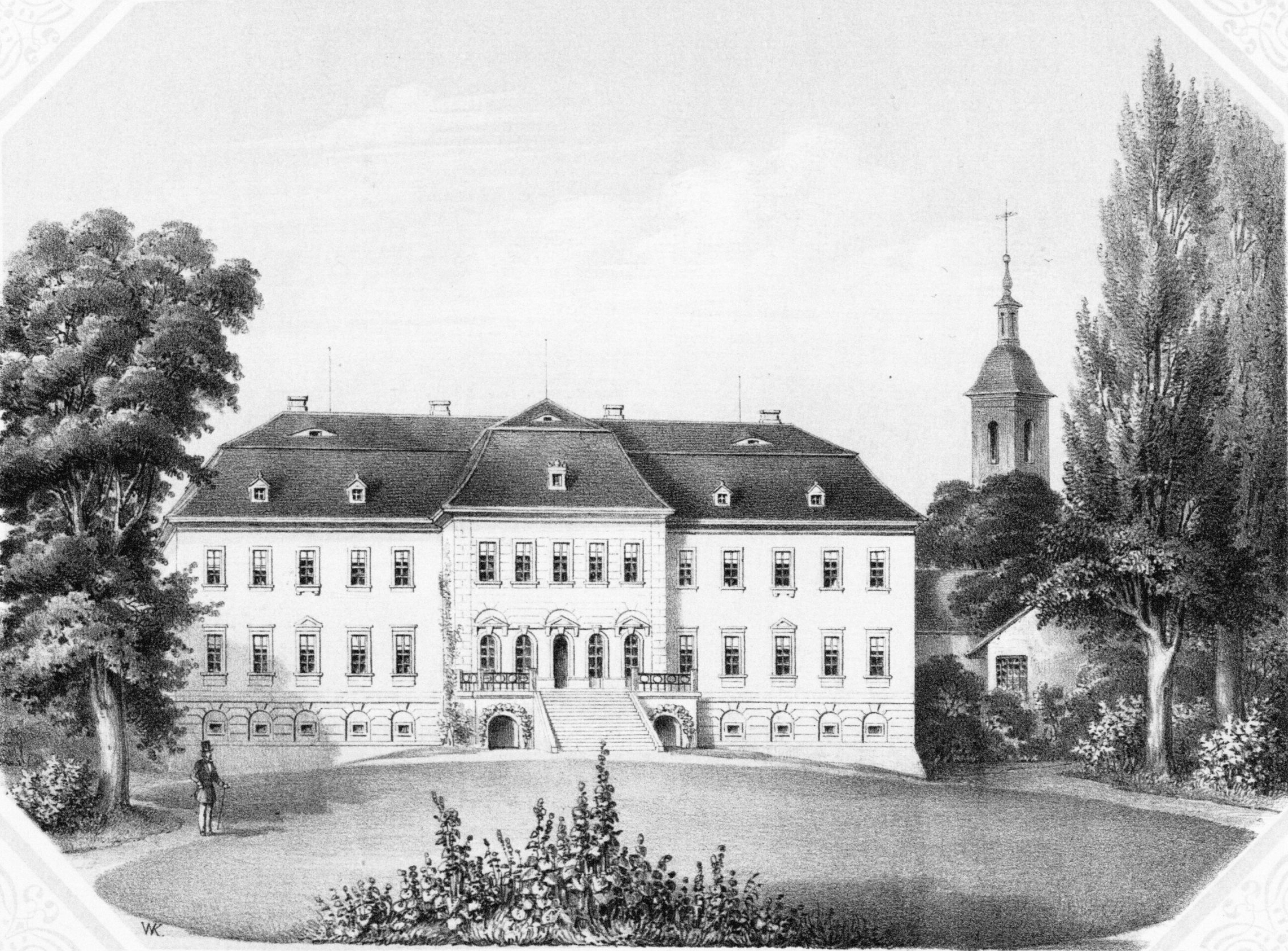 Das Schloss Gaußig Mitte des 19. Jahrhunderts Hornjoserbsce: Hušćanski hród srjedź 19. lětstotka